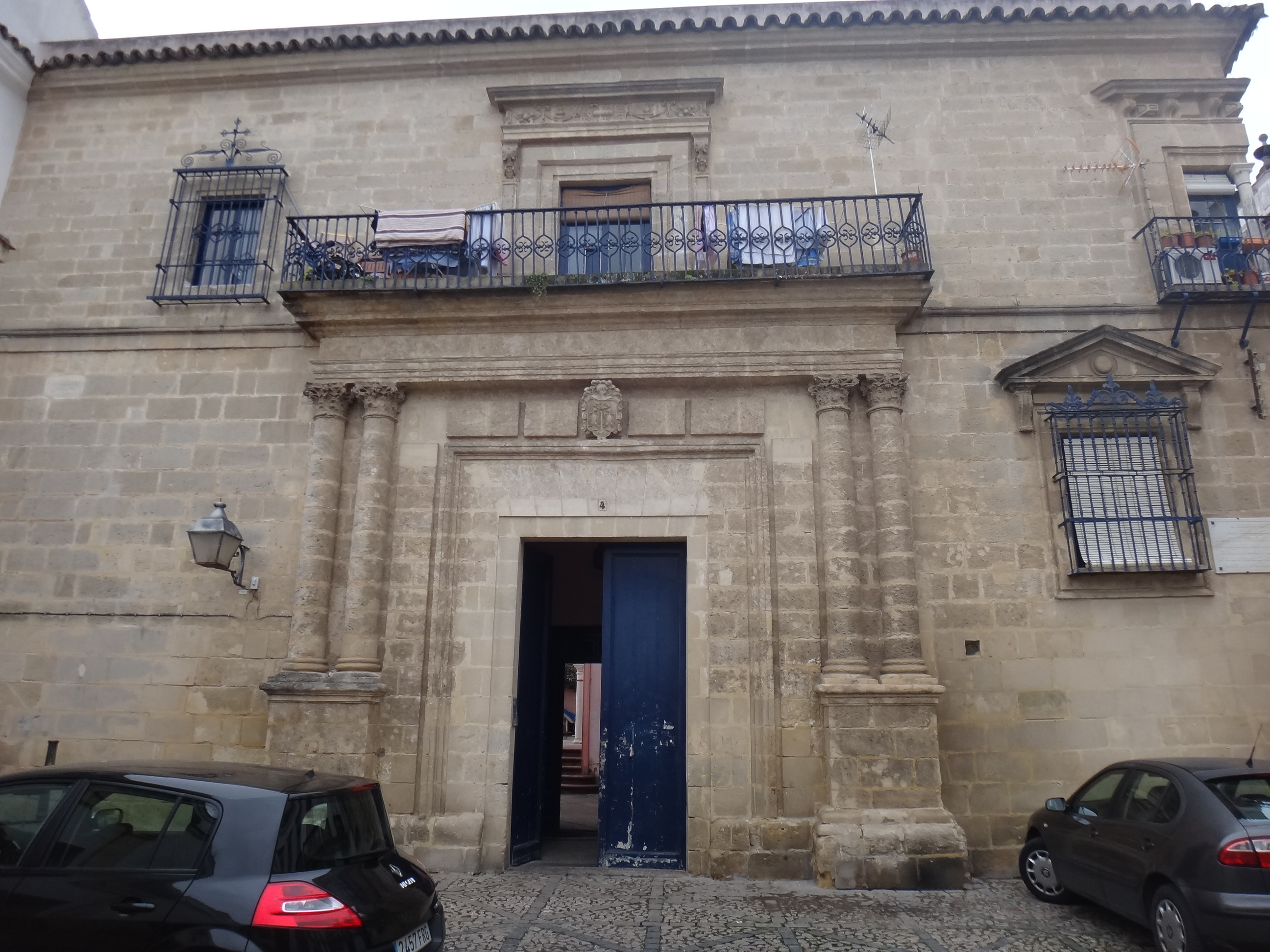 Palacio Dávila, Jerez de la Frontera (Andalucía, España).